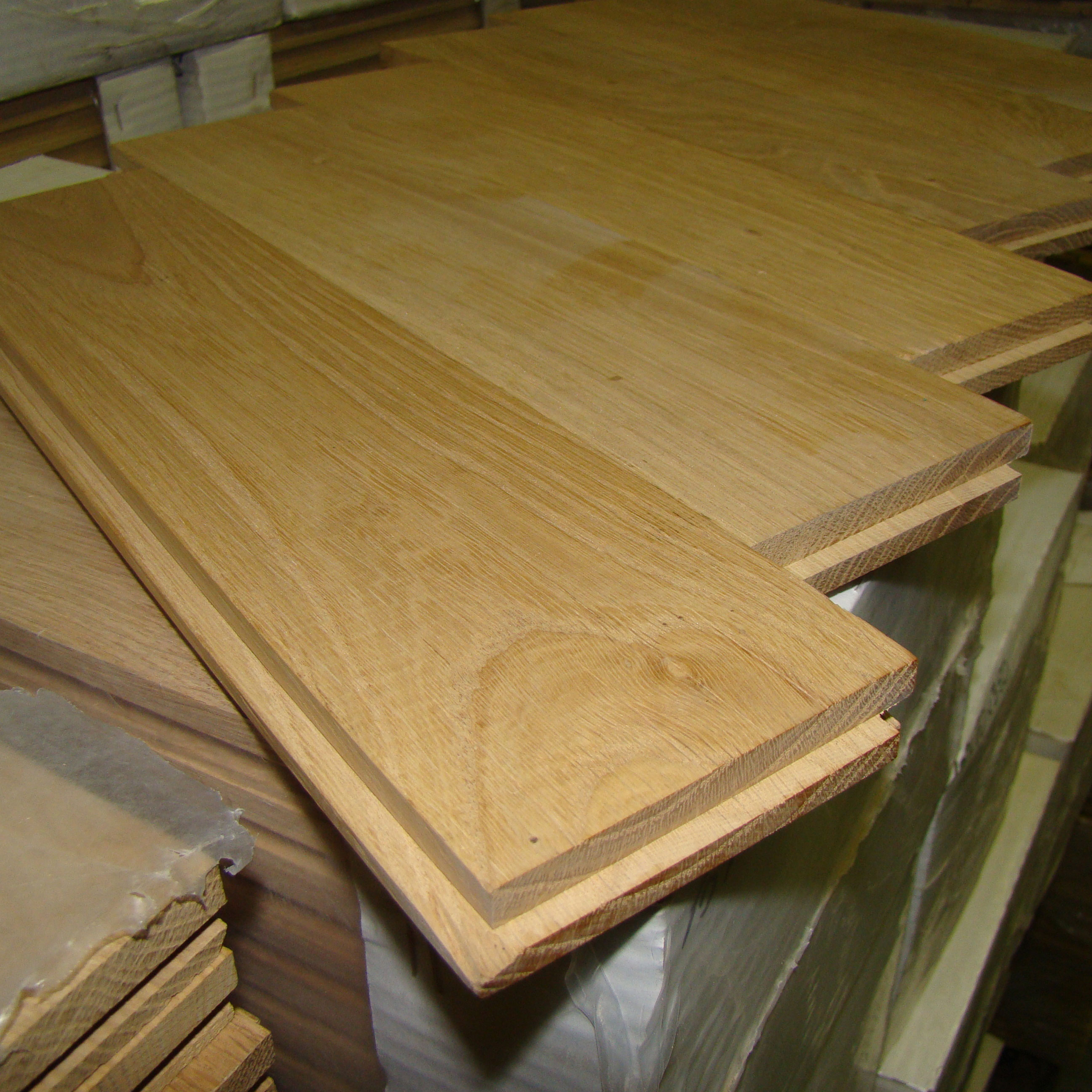 Штучный паркет дубовый селект